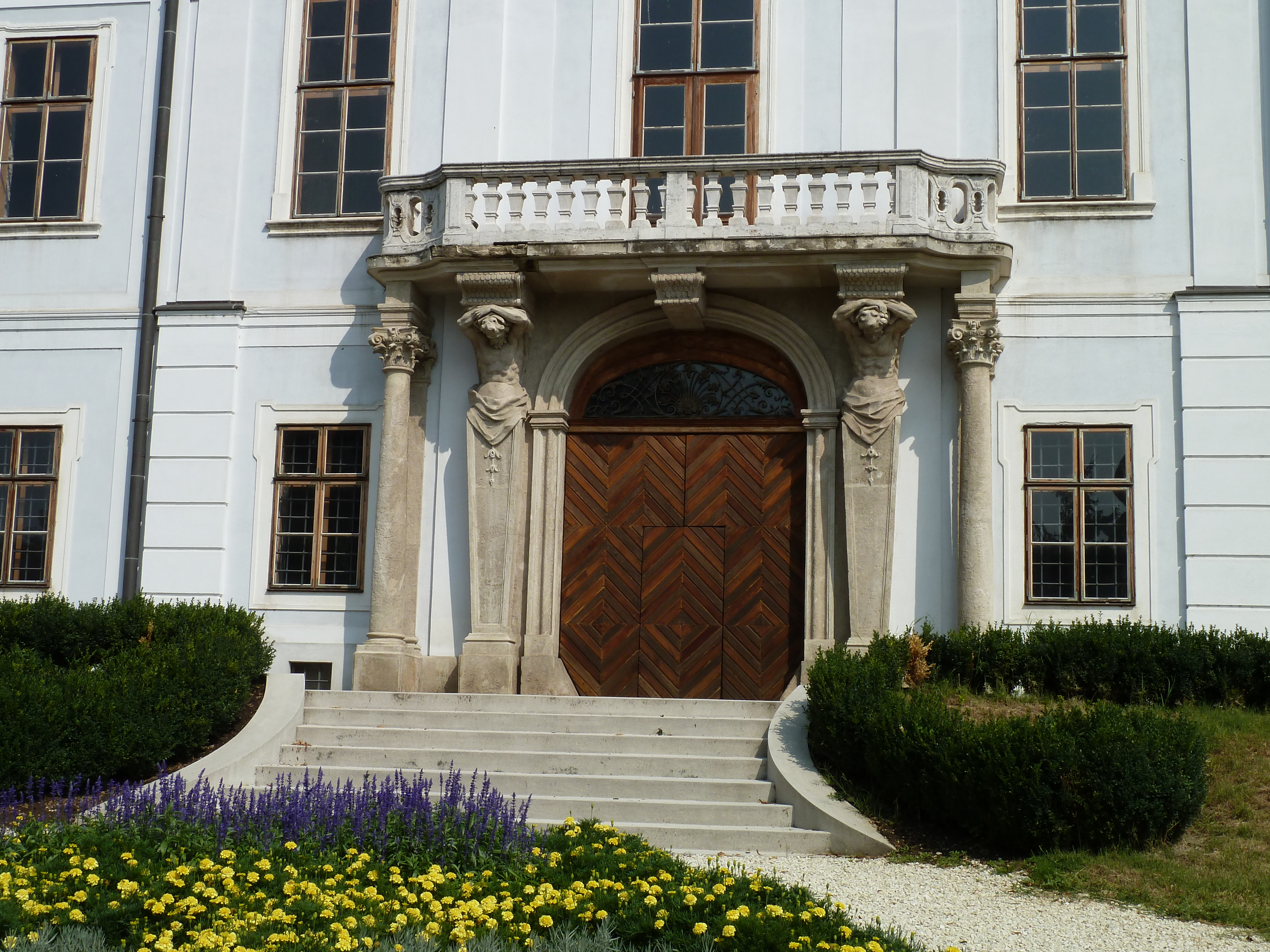 A Grassalkovich-kastély bejárata, Hatvan